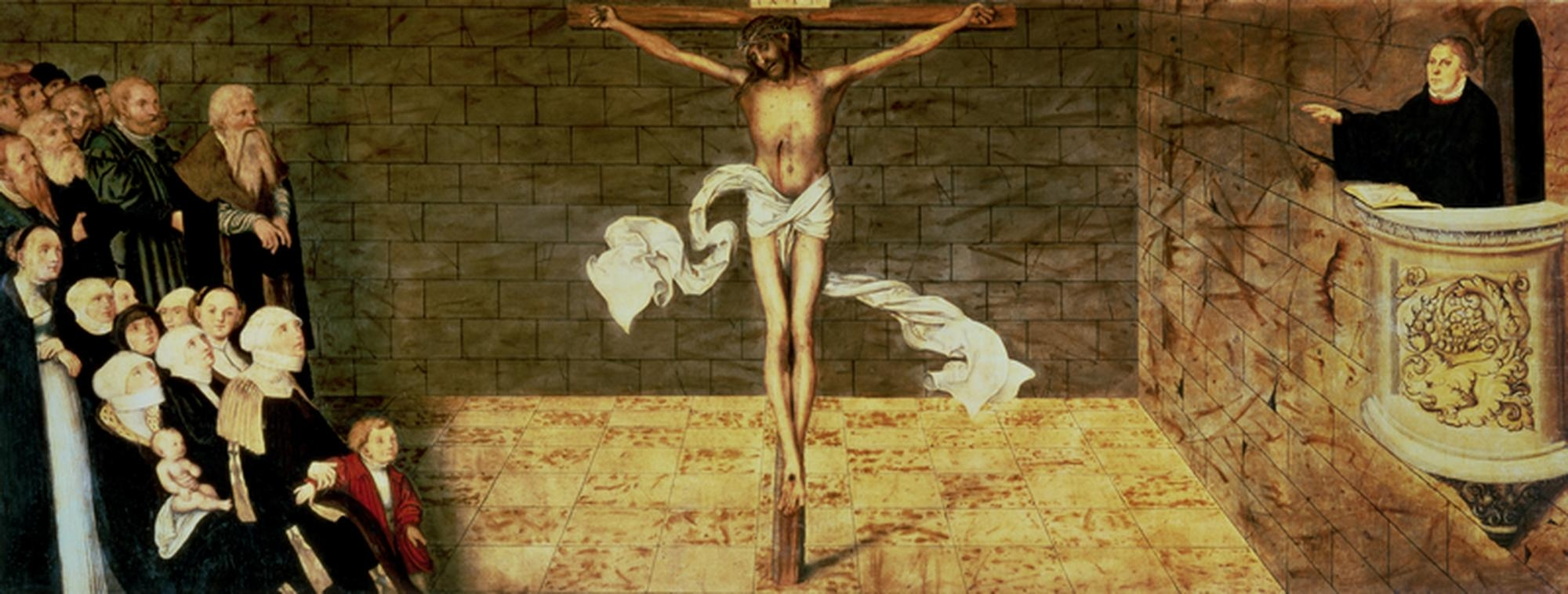 Reformation altarpiece, Stadt- und Pfarrkirche St. Marien zu Wittenberg, Predella (The Last Supper with Luther amongst the Apostles)